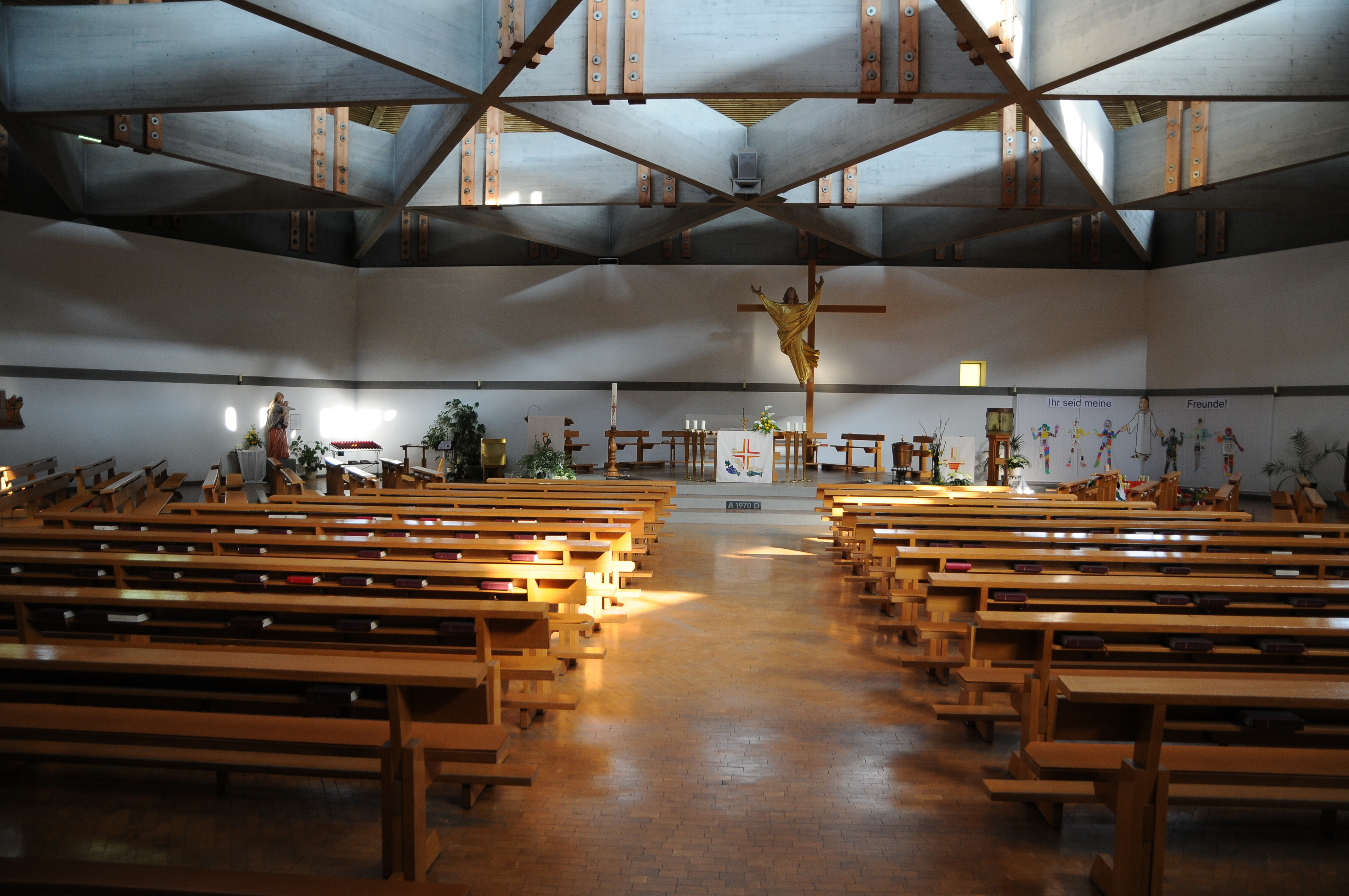 Pfarrkirche hl. Konrad, an der Konrad-Renn-Straße 2 in Hohenems.